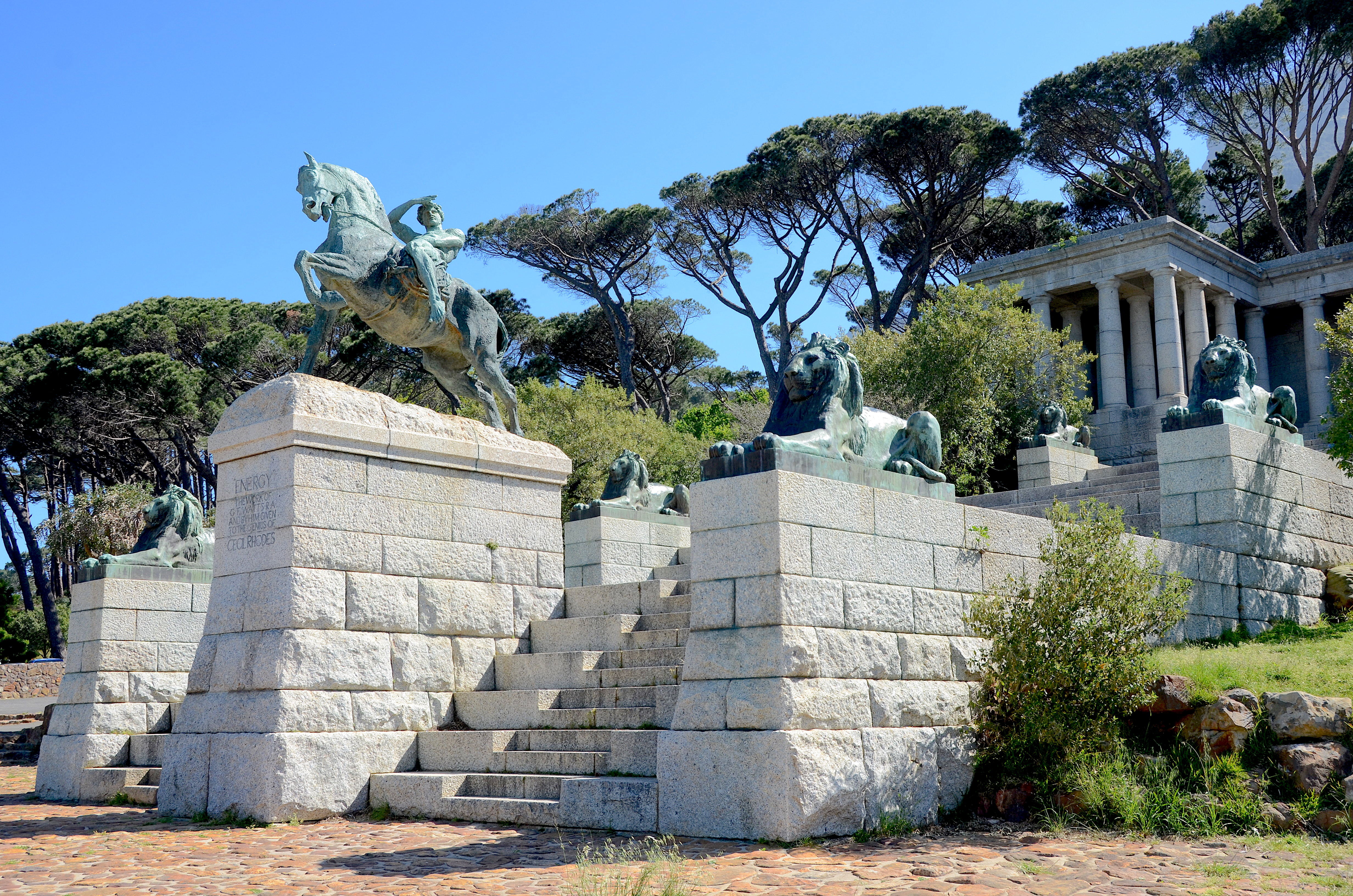 Rhodes Memorial in Kapstadt (Südafrika)